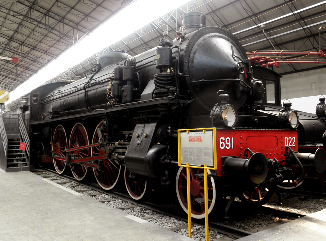 Locomotiva gruppo 691 delle Ferrovie dello Stato, conservata al Museo della Scienza e della Tecnologia di Milano